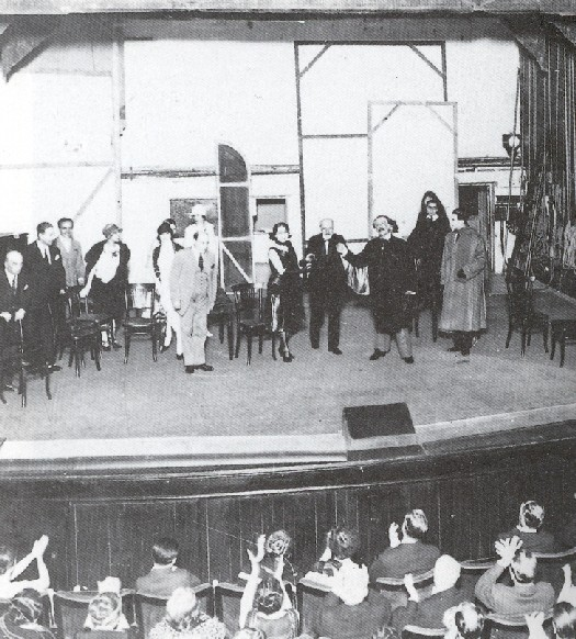 Nell’Aprile 1923 si reca a Parigi per assistere alla messa in scena di “Sei personaggi in cerca d’autore”.